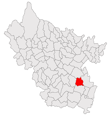 Categorie:Hărţi ale judeţului Buzău